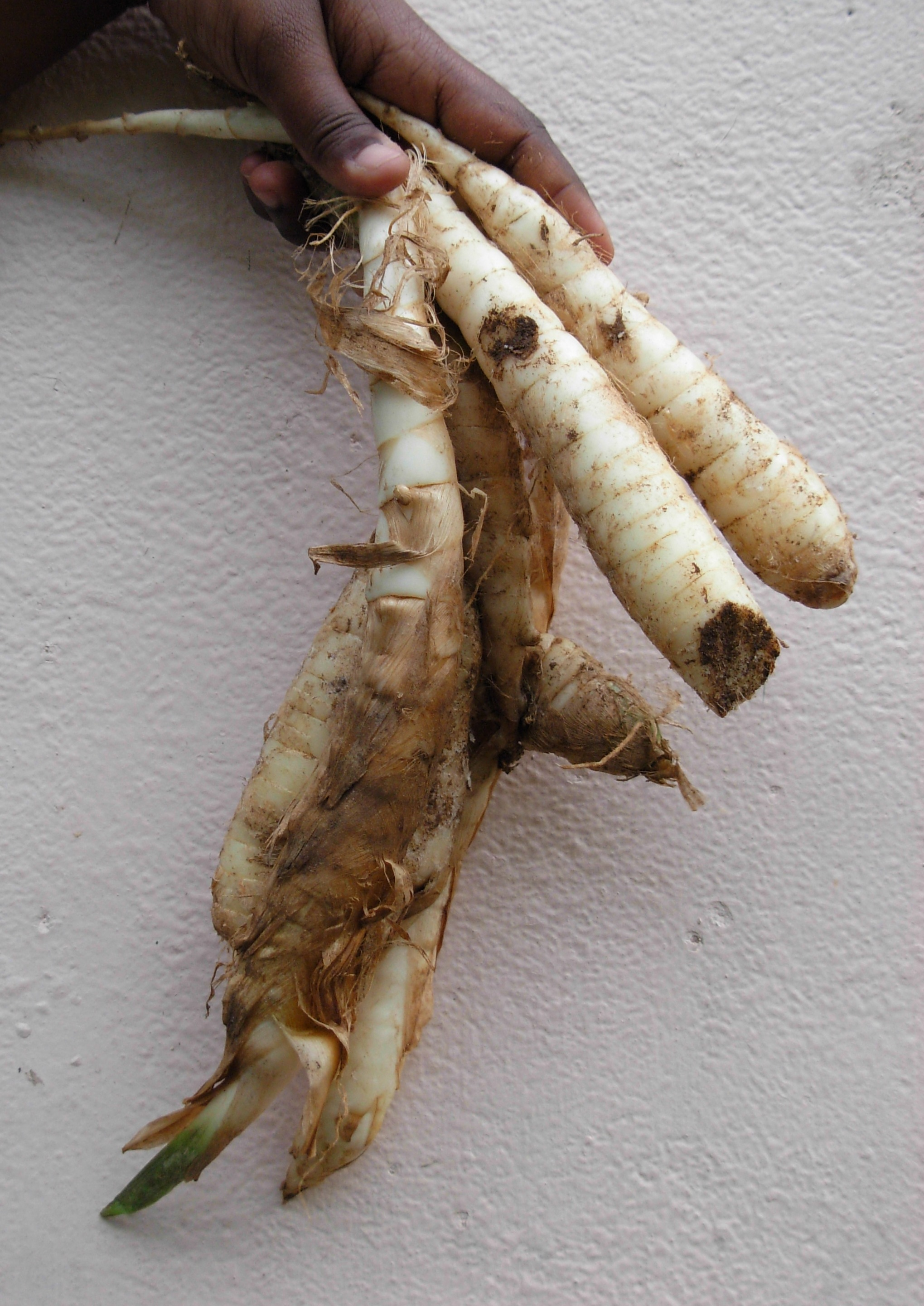 കൂവക്കിഴങ്ങ്